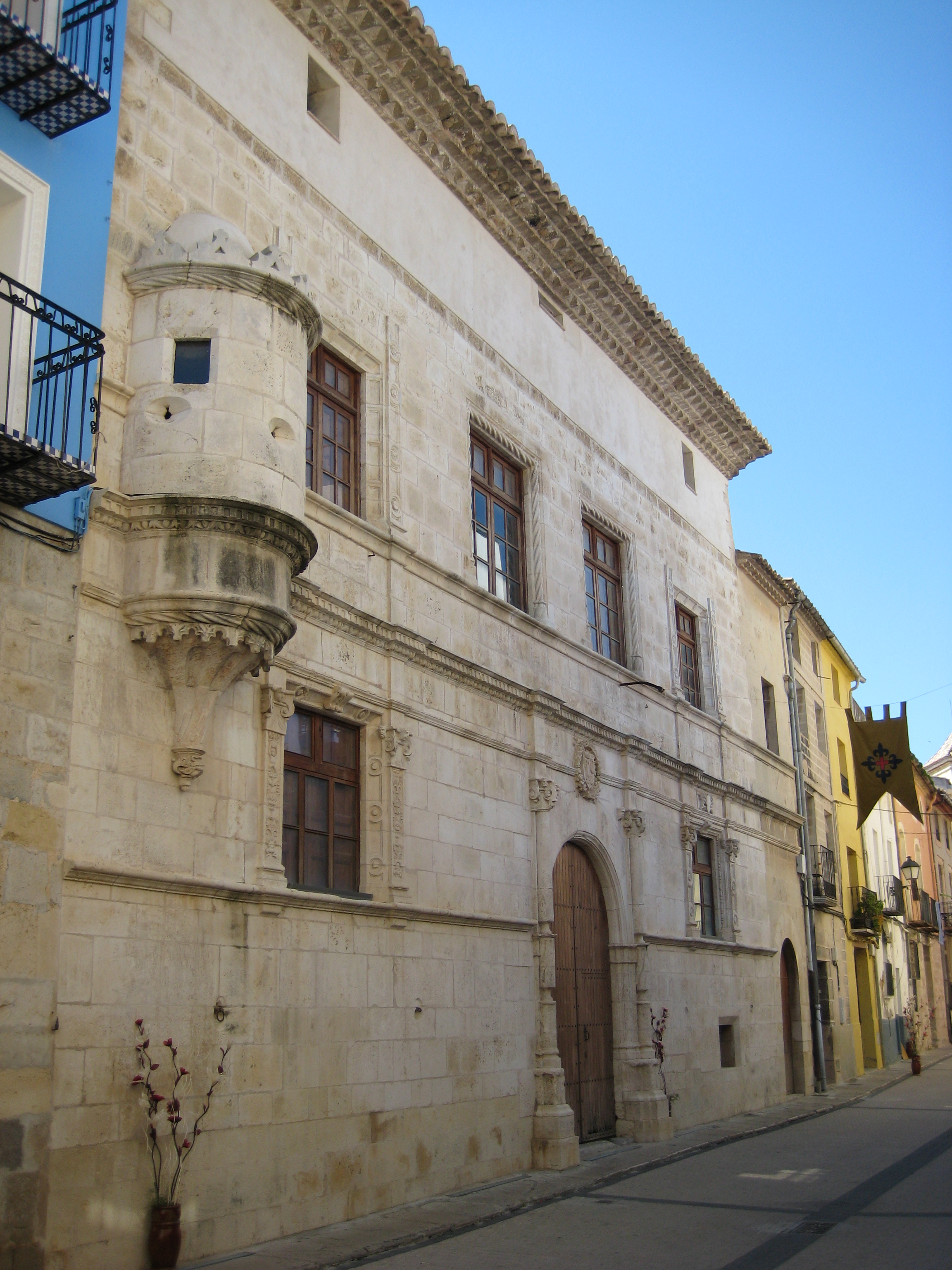 Palau del Marqués de Villores de Sant Mateu (Baix Maestrat)